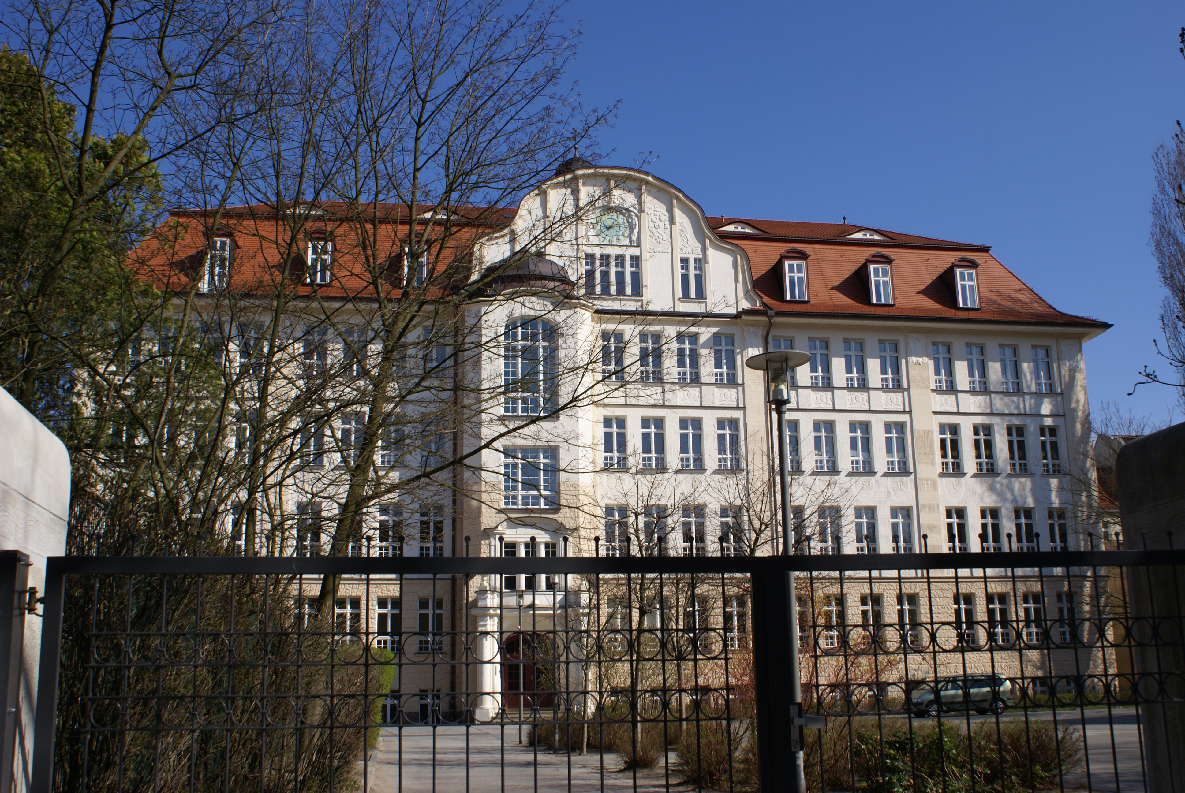 Stechlinsee-Schule in Friedenau